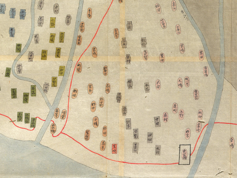 文化8年、牛首堂の写。新川郡内の各地名をその郷庄によって色分けし分類したもので、富田景周の『三州地理志稿』の記述の如く、当村内においては日方江・針木・日影は長榎郷に、黒崎は高野郷に、針原横越・平榎・野田・高来は針原郷とされているのがわかる。富山県立図書館古絵図・貴重書ギャラリー（